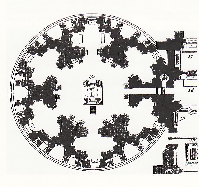 Plan de 1706 par Dom Félibien montrant l'intégration de la rotonde des Valois dans l'abbatiale et la voie de communication choisie dans l'épaisseur du portail latéral du transept nord